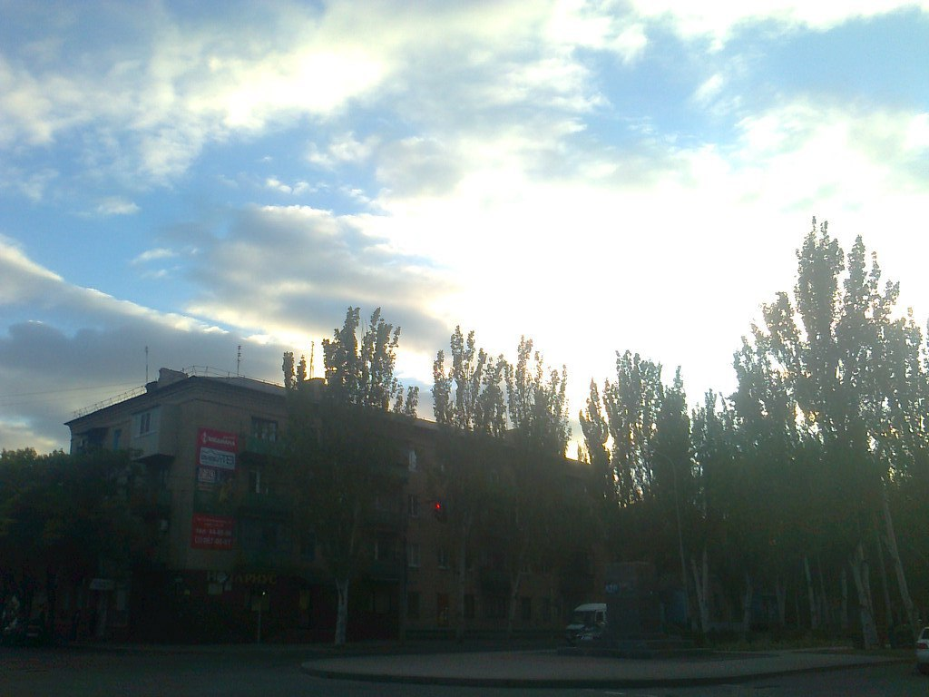 На этом постаменте стоял памятник Ленину